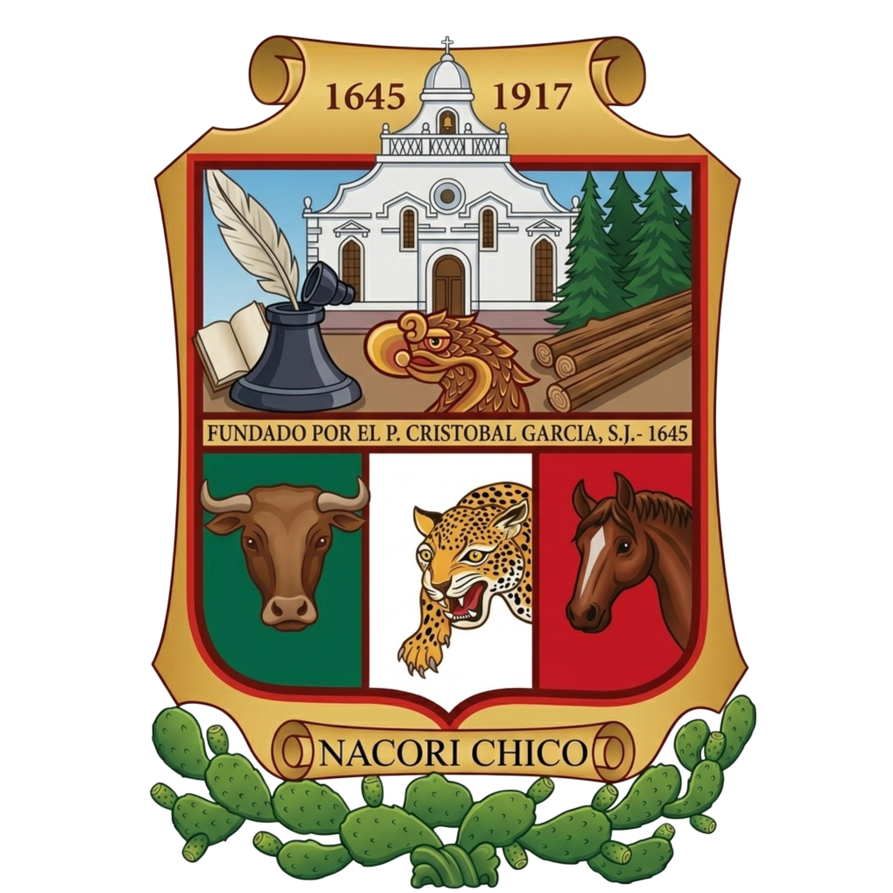 Escudo de armas del municipio de Nacori Chico